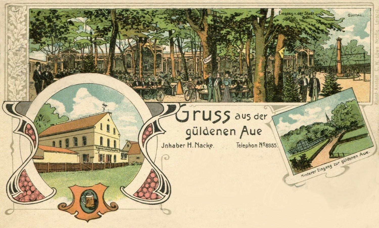 Restaurant Güldene Aue in Plaußig um 1900